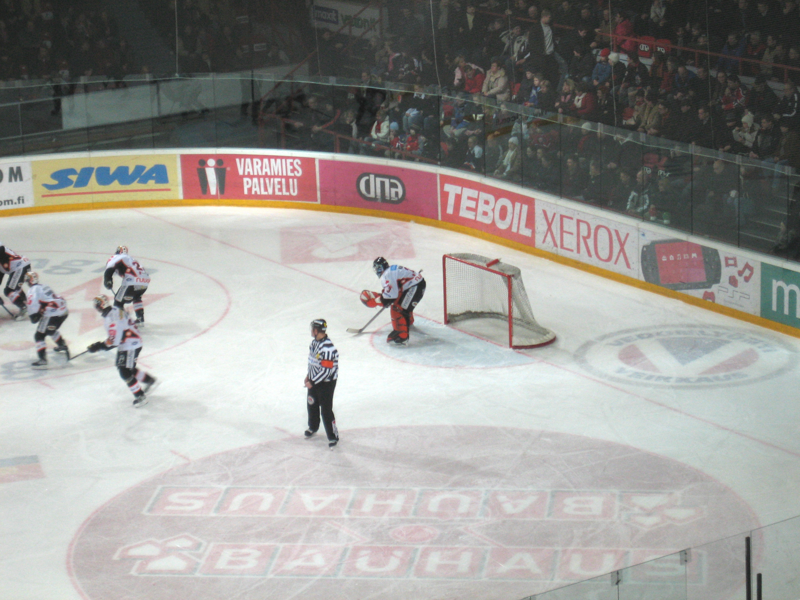 Karri Rämö, HPK. Kuvattu 19.1.2006 Helsingin jäähallissa.